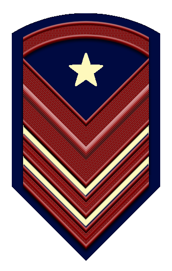 Primo aviere capo scelto Qualifica Speciale